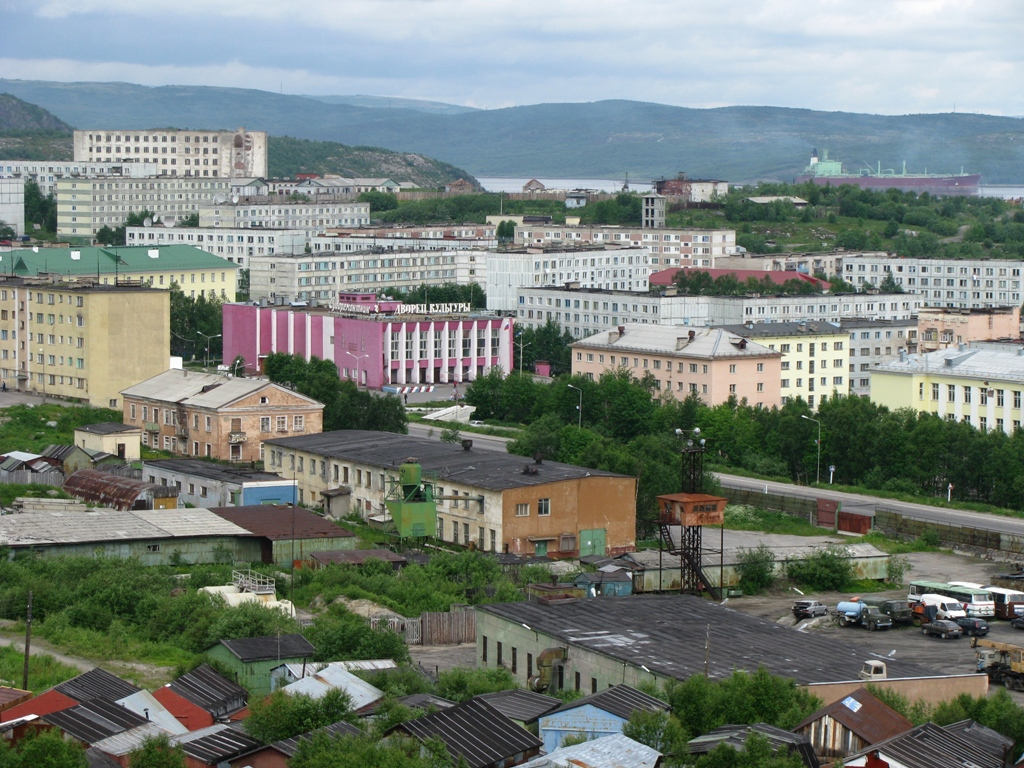 Посёлок Росляково